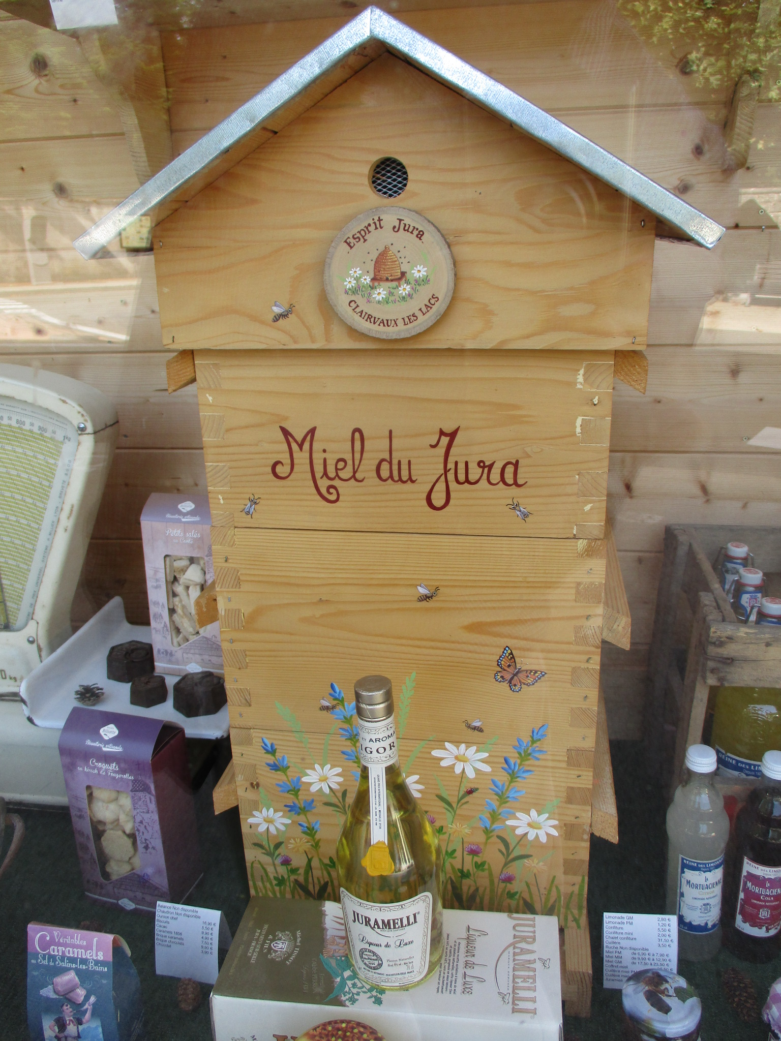 Miel du Jura